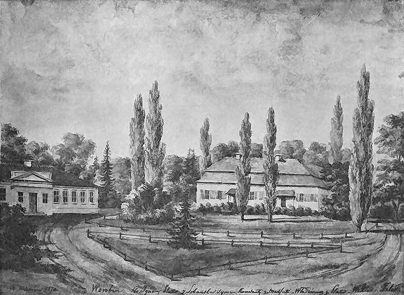 Беларуская (тарашкевіца): Сядзіба Плятэраў у Варобіне (Дубровіца), Н. Орда